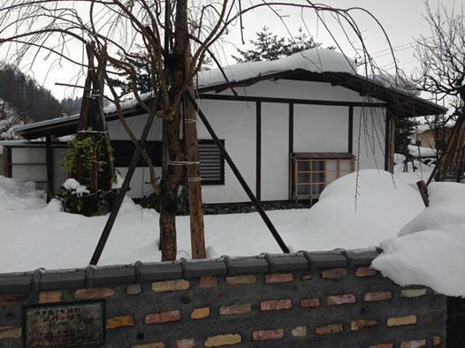 試作住宅の写真